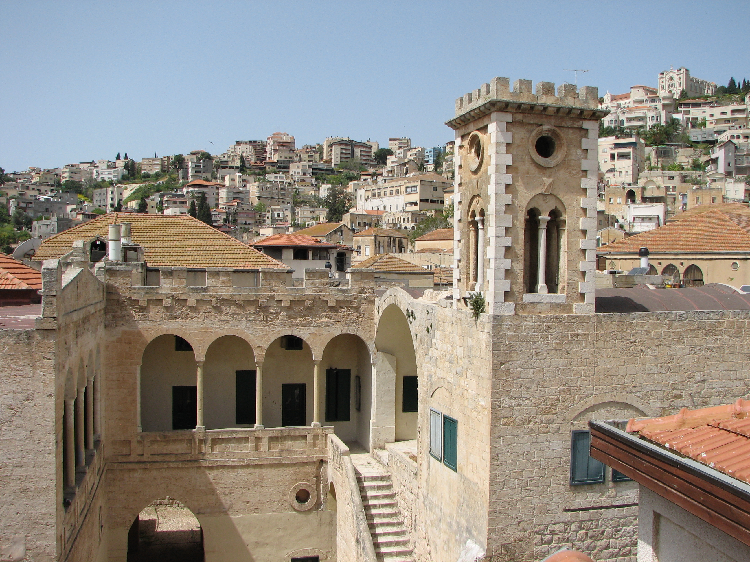 Saraya Building Nazareth was built by Daher el-Omar in 1740. The bulding was used as Governmental center בית הסראייה בעיר נצרת, הוא מבנה שהקים דאהר אל-עומר, שליט הגליל באמצע המאה ה-18, ואשר שימש כמרכז השלטוני בעיר. הבניין בין שתי הקומות הוקם בסביבות שנת 1740. הבניין שימש עד שנת 1991 כבית עיריית נצרת